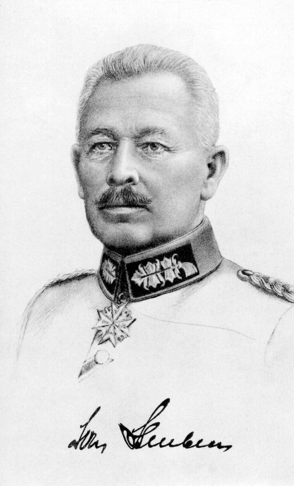 Es handelt sich um eine Zeichnung nach Vorlage eines Privatfotos